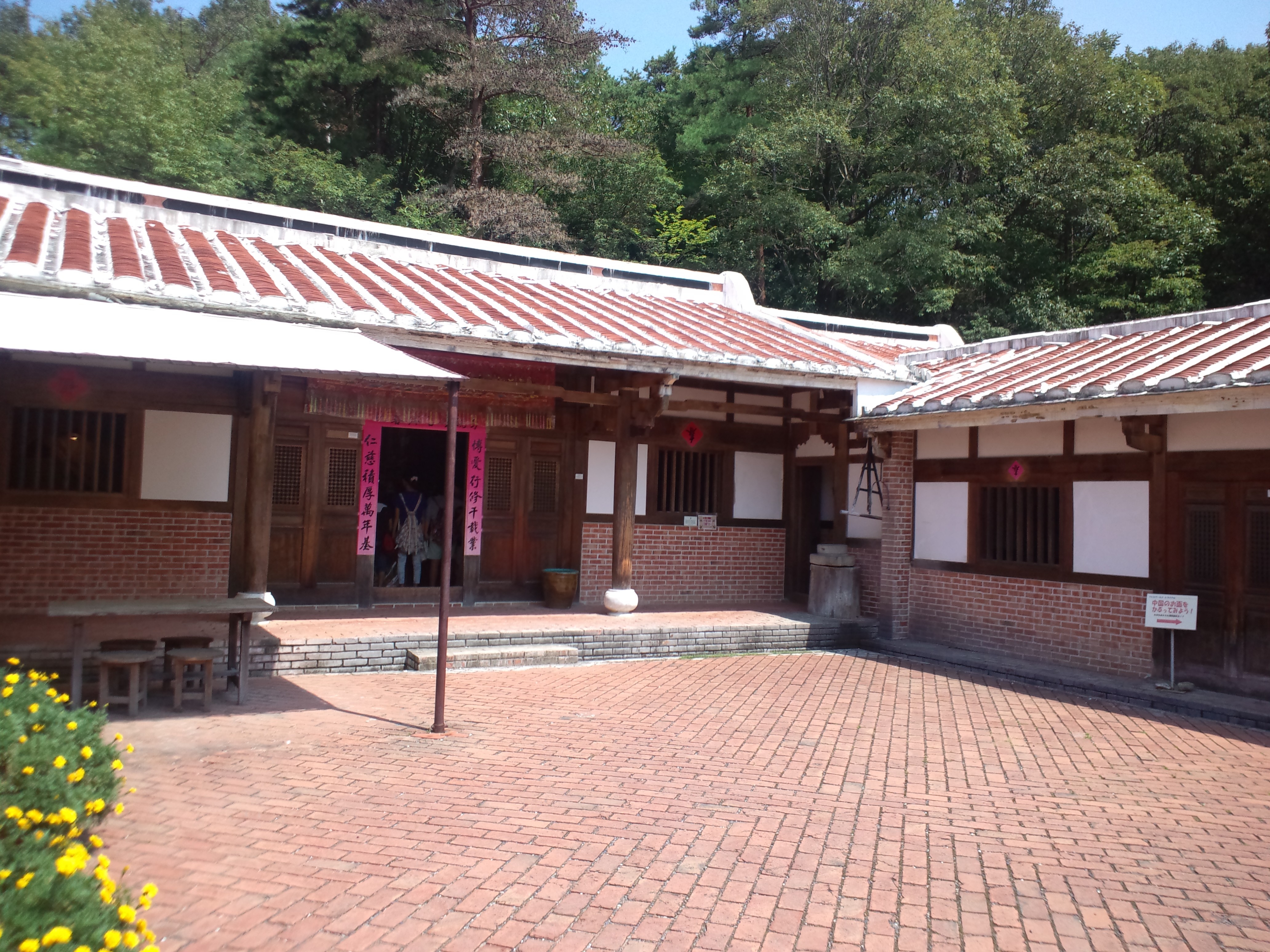 リトルワールド 台湾 農家